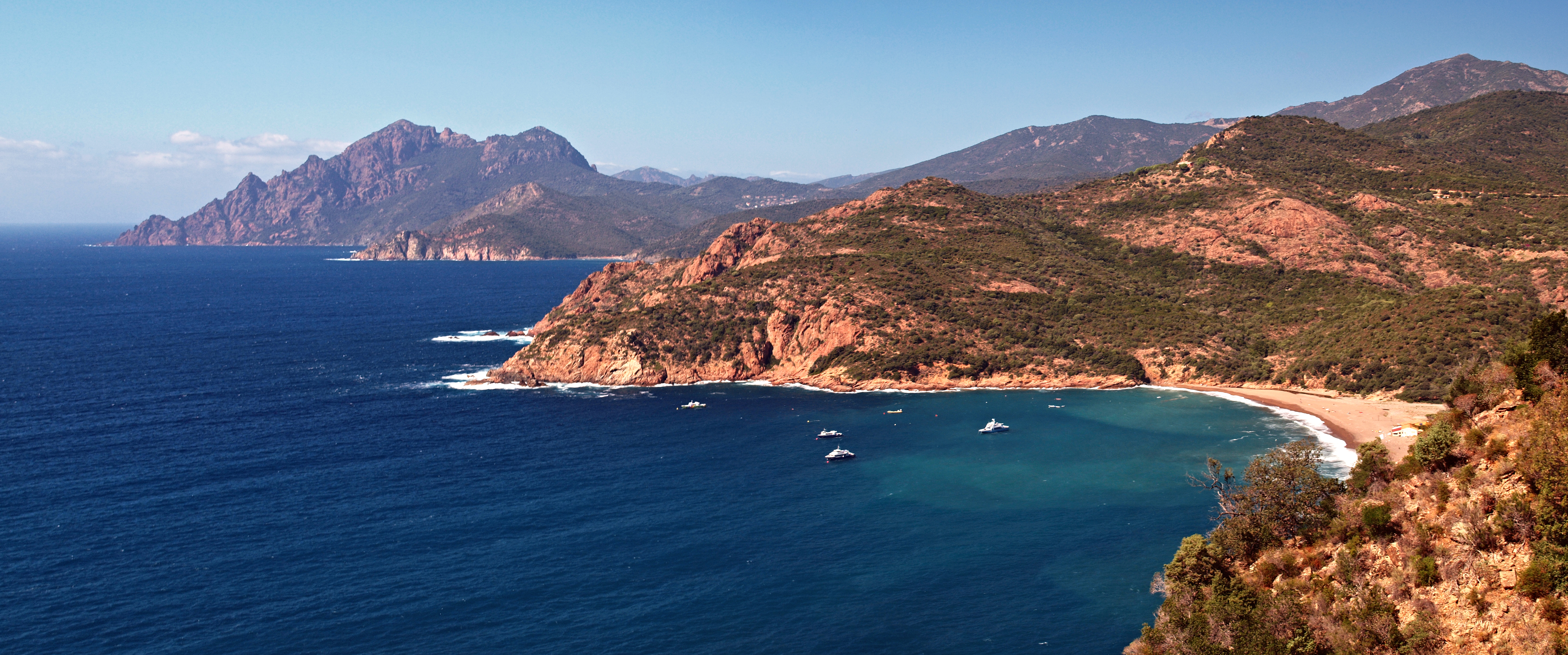 Porto (Corsica) - Littoral nord du golfe de Porto